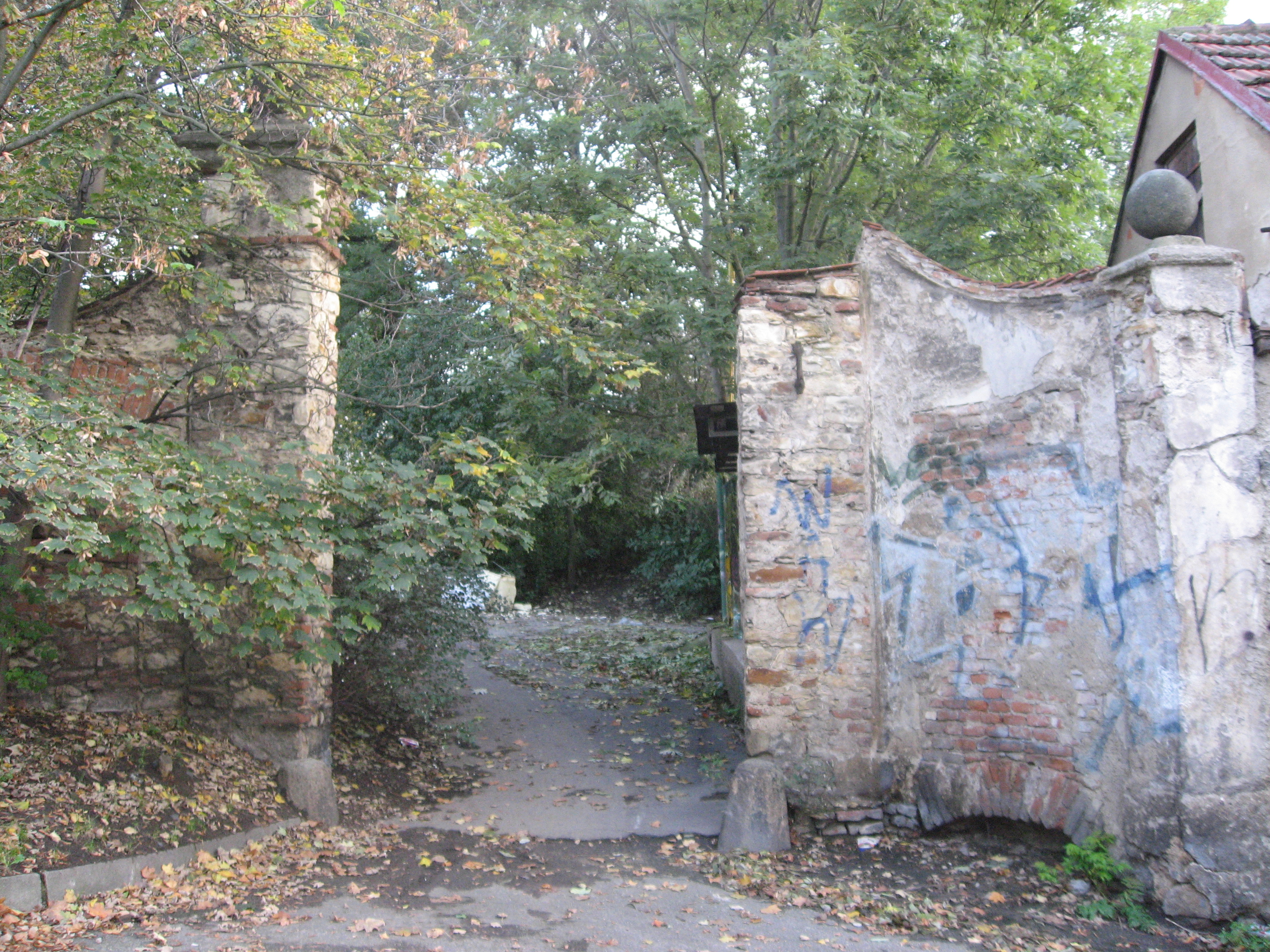 Riegrovy sady